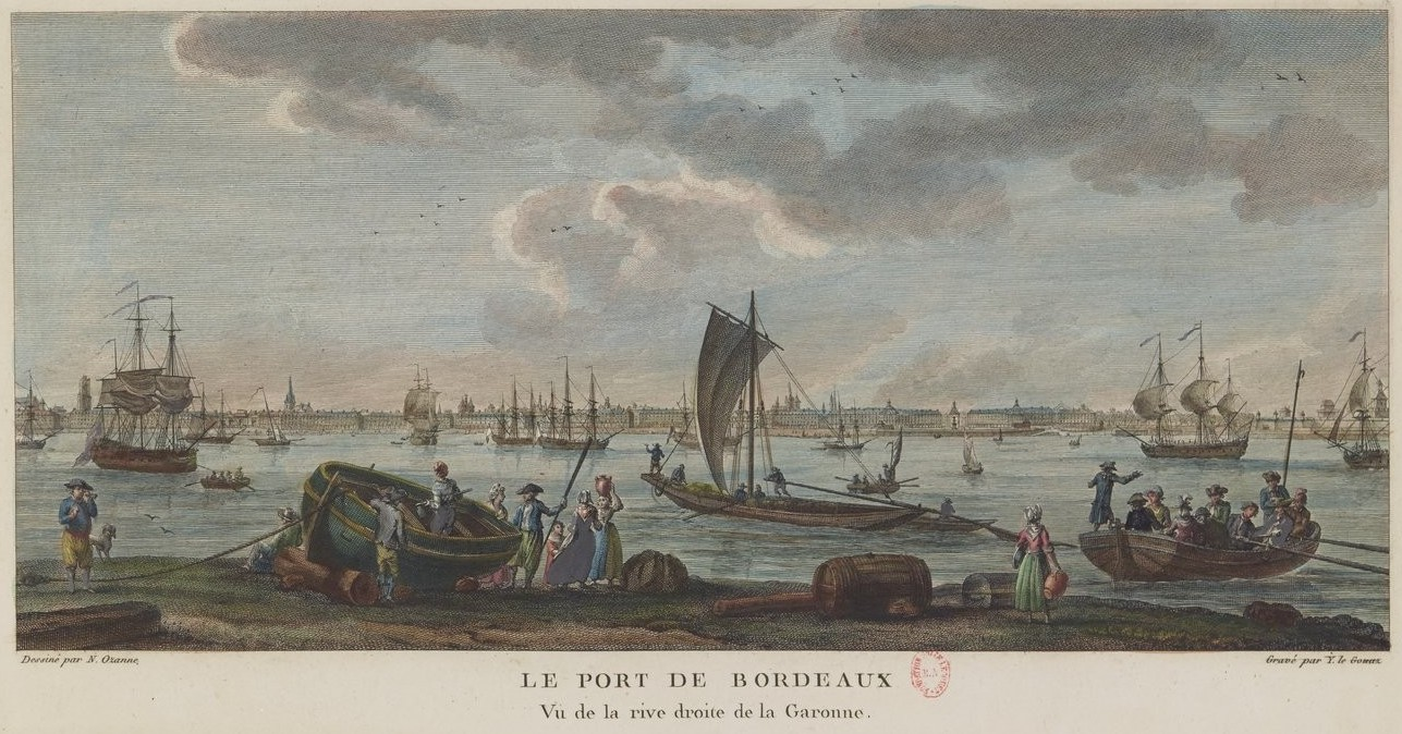 Planche tirée des Nouvelles vues perspectives des ports de France dessinées pour le Roi par M. Ozanne. Gravées par Y. Le Gouaz en 1776.